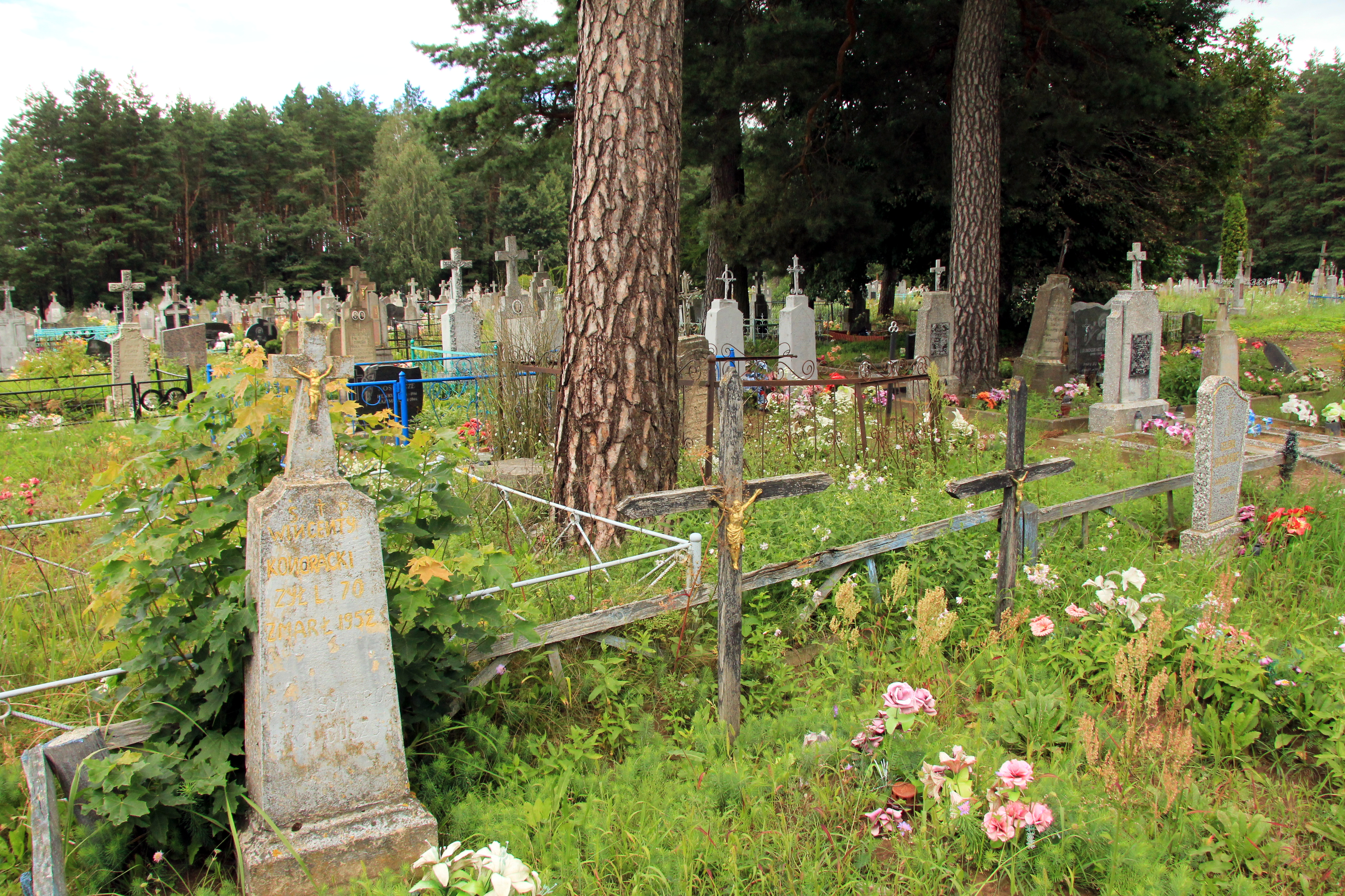 Nacza, rejon werenowski, obwód grodzieński, Białoruś - cmentarz parafialny